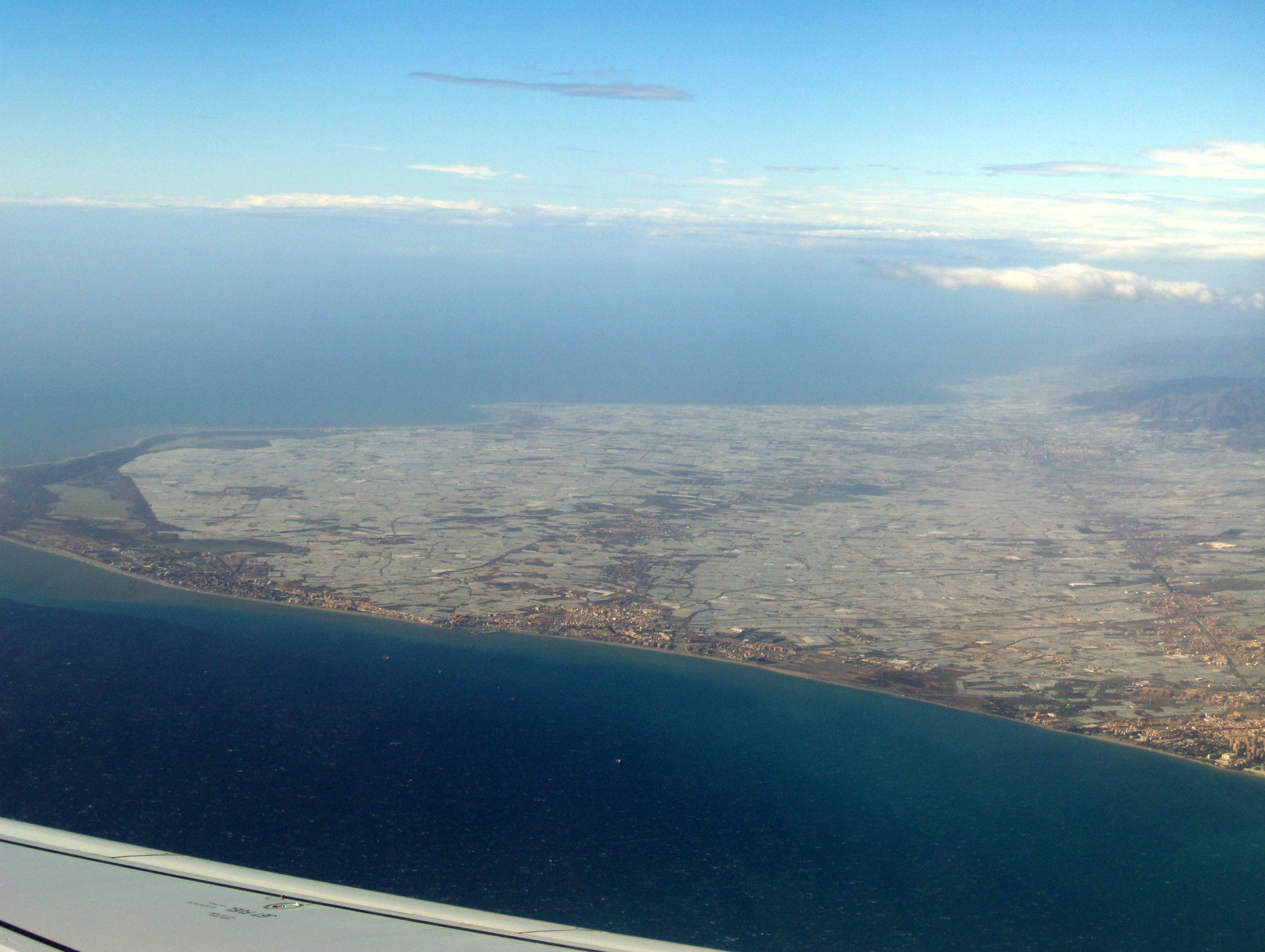 El Mar de Plástico, en la provincia de Almería